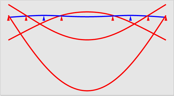 GNU-FDL selbstgebaut